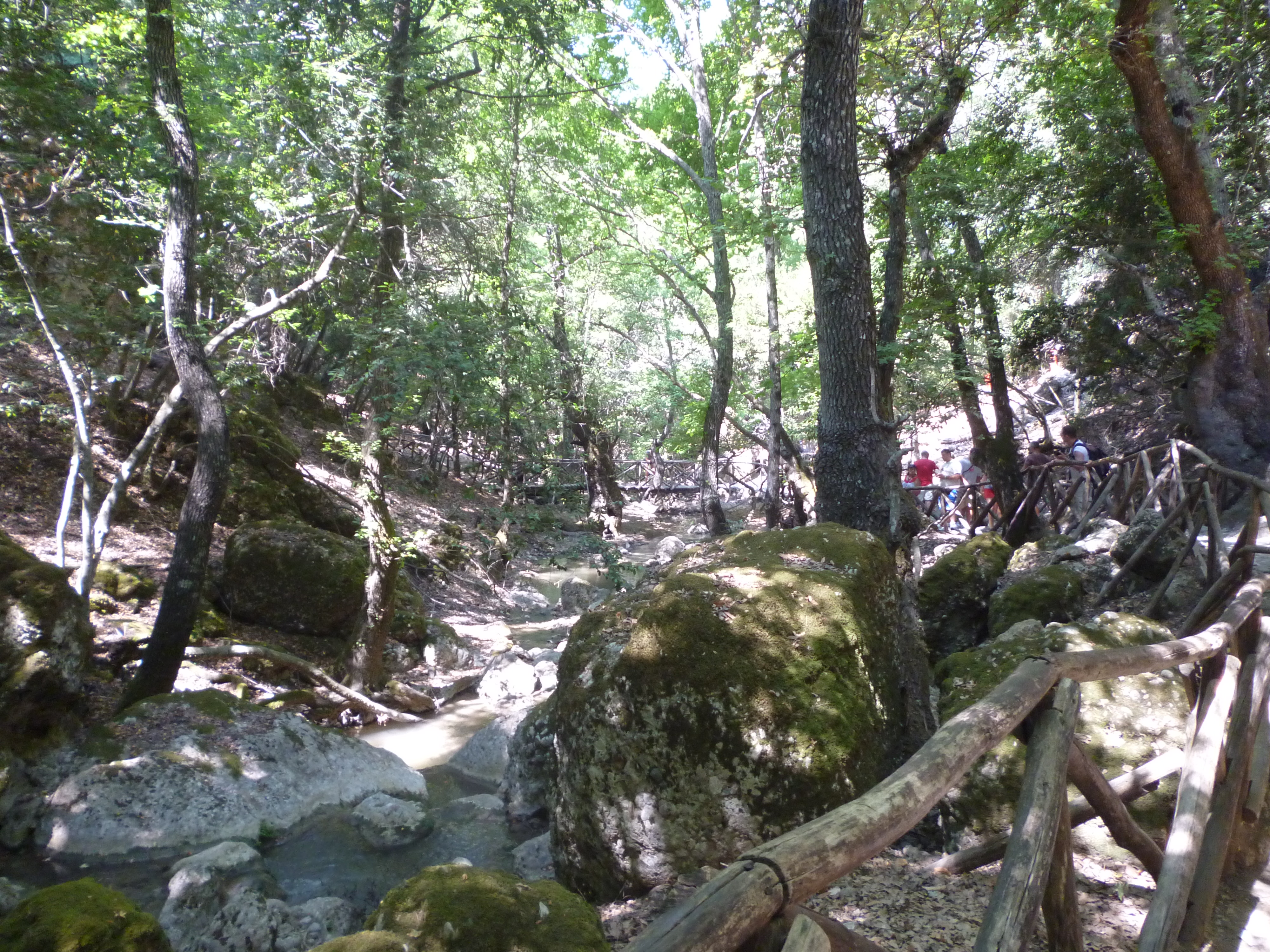 Η κοιλάδα των πεταλούδων